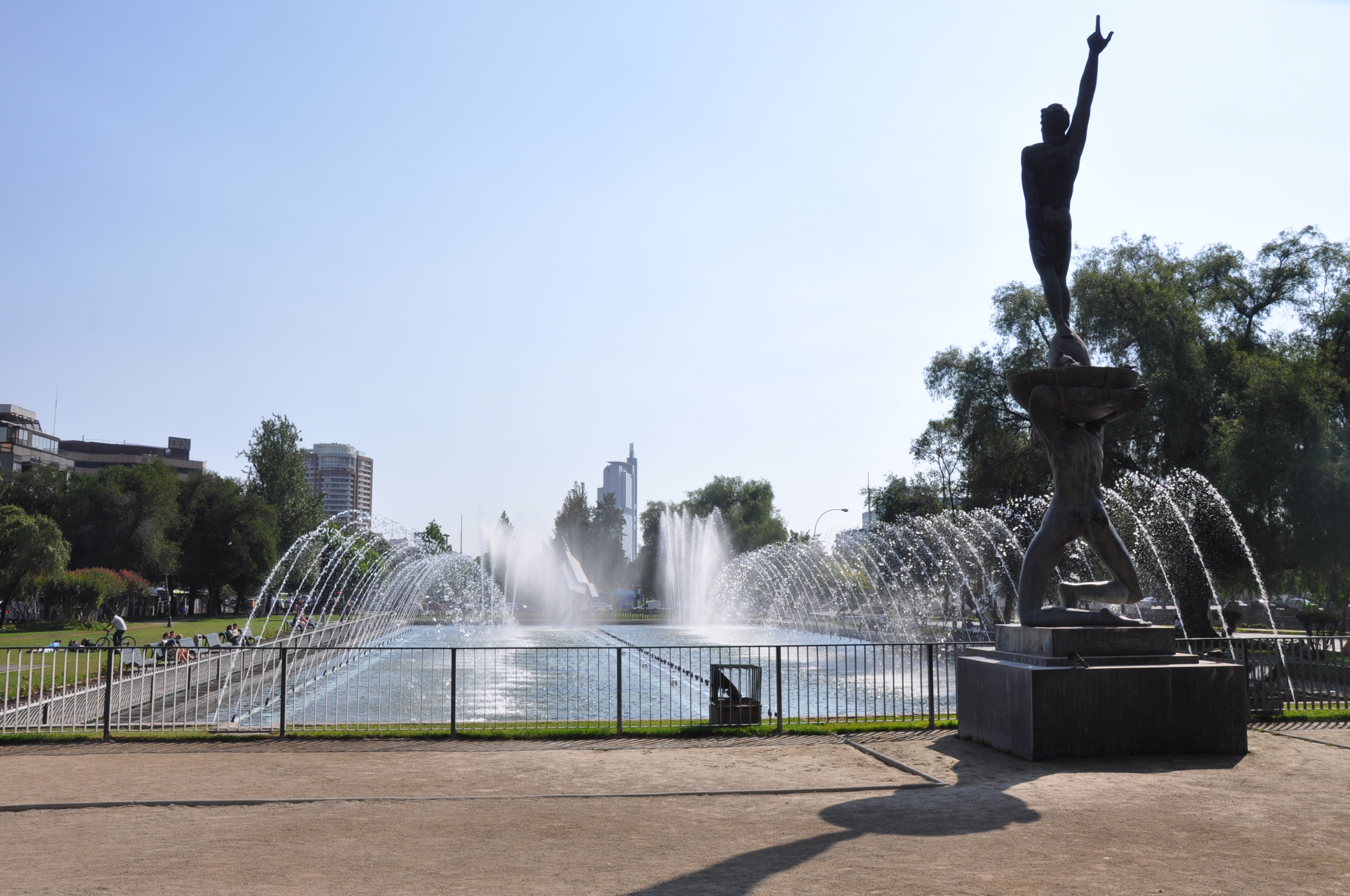 Fuente del Bicentenario (Bicentenary Fountain) - Parque Balmaceda